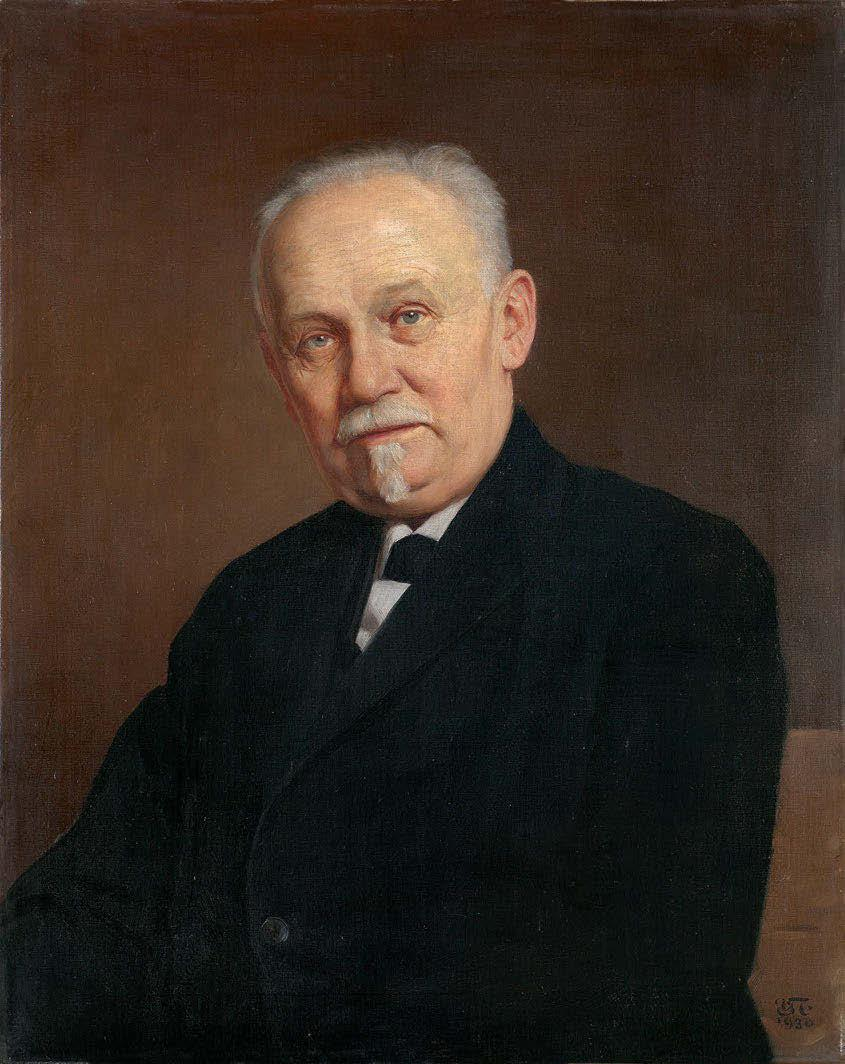 Слободан Јовановић, слика Уроша Предића из 1931.